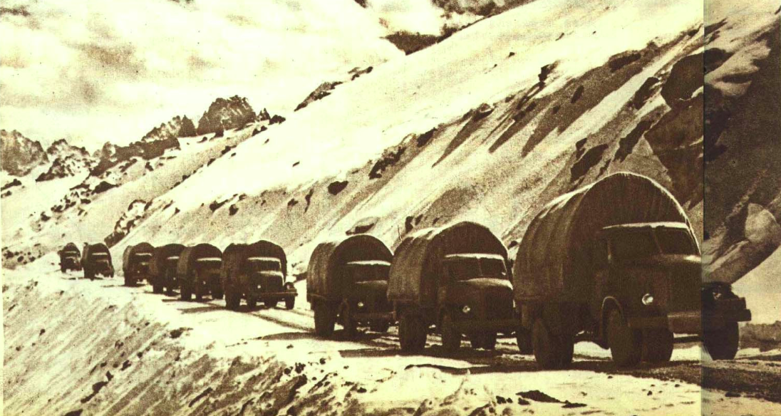 1953年康藏公路